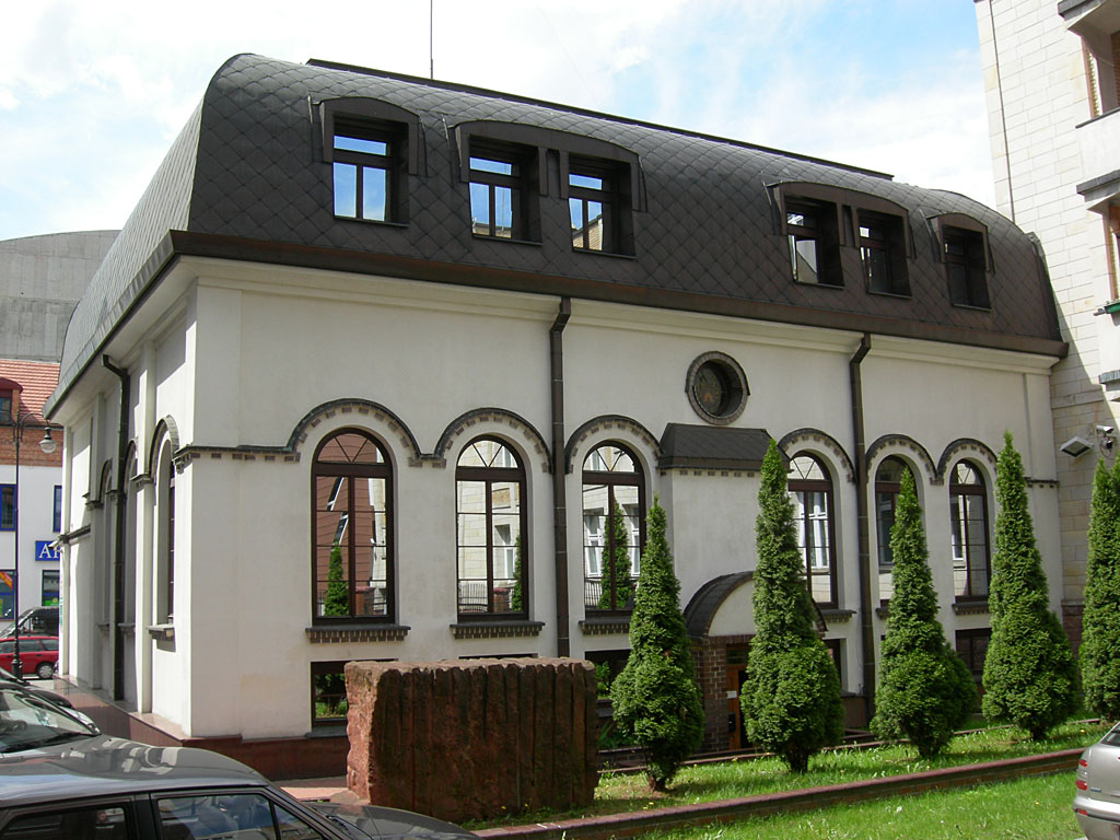 Centre de l'Esperanto à Białystok